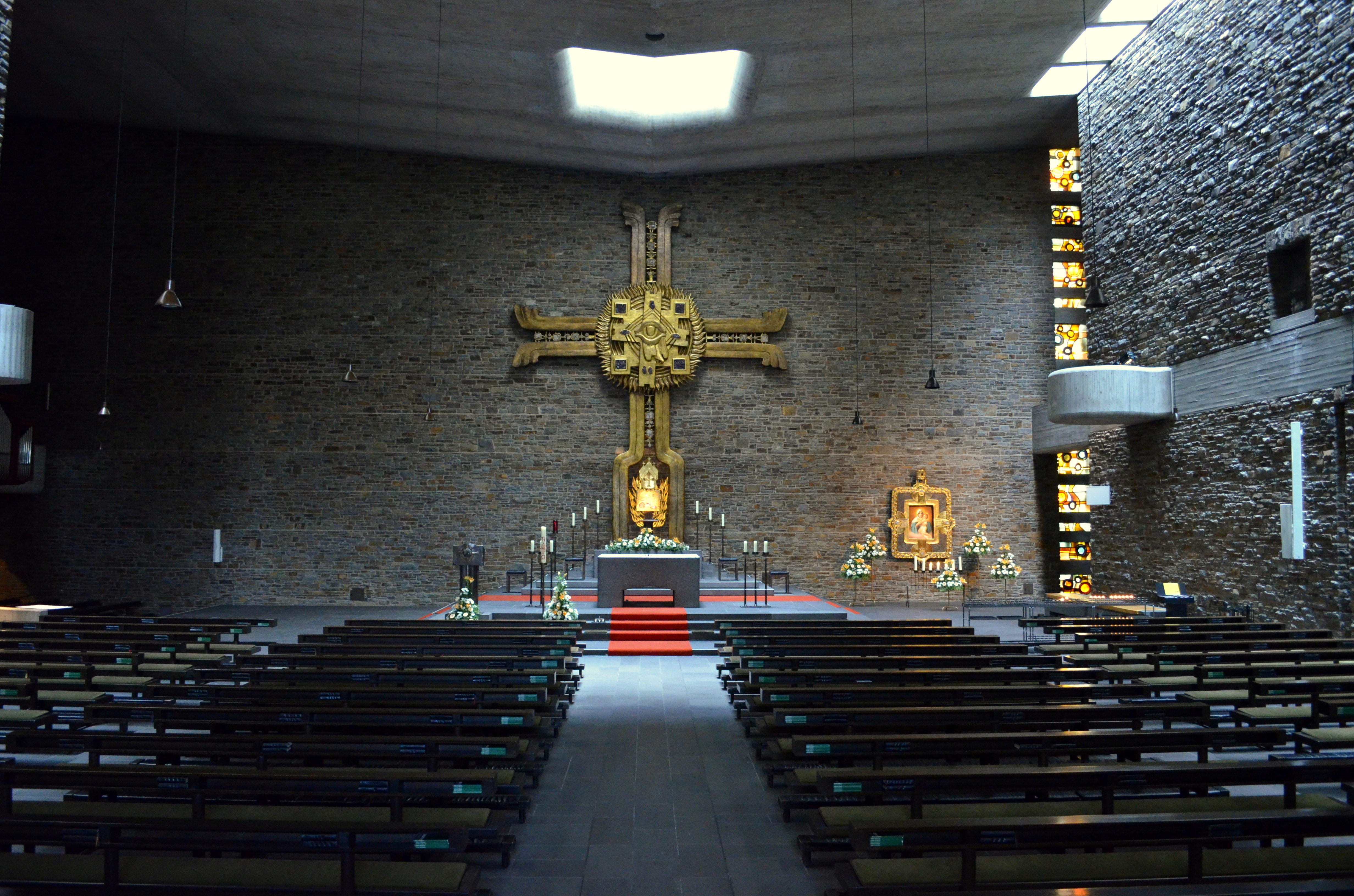 Vallendar-Schönstatt Aanbiddingskerk Interieur